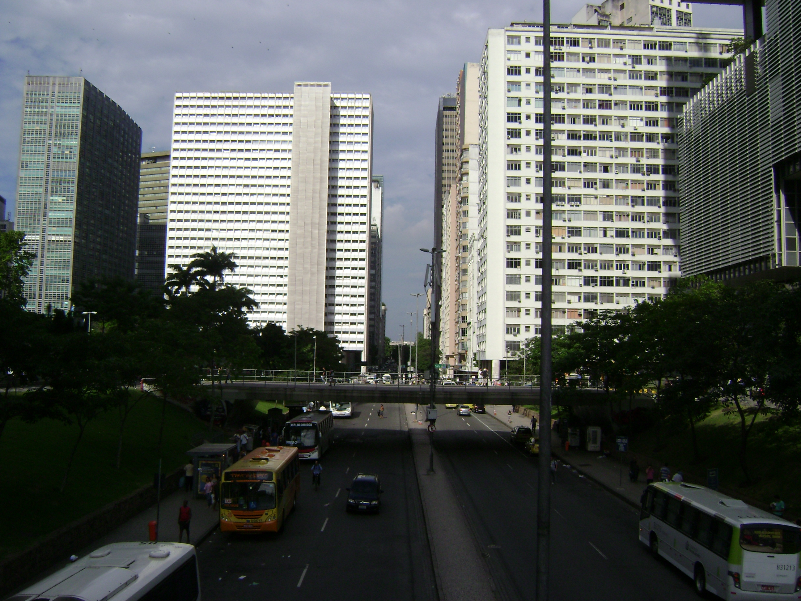 Avenida Chile, na cidade do Rio de Janeiro.